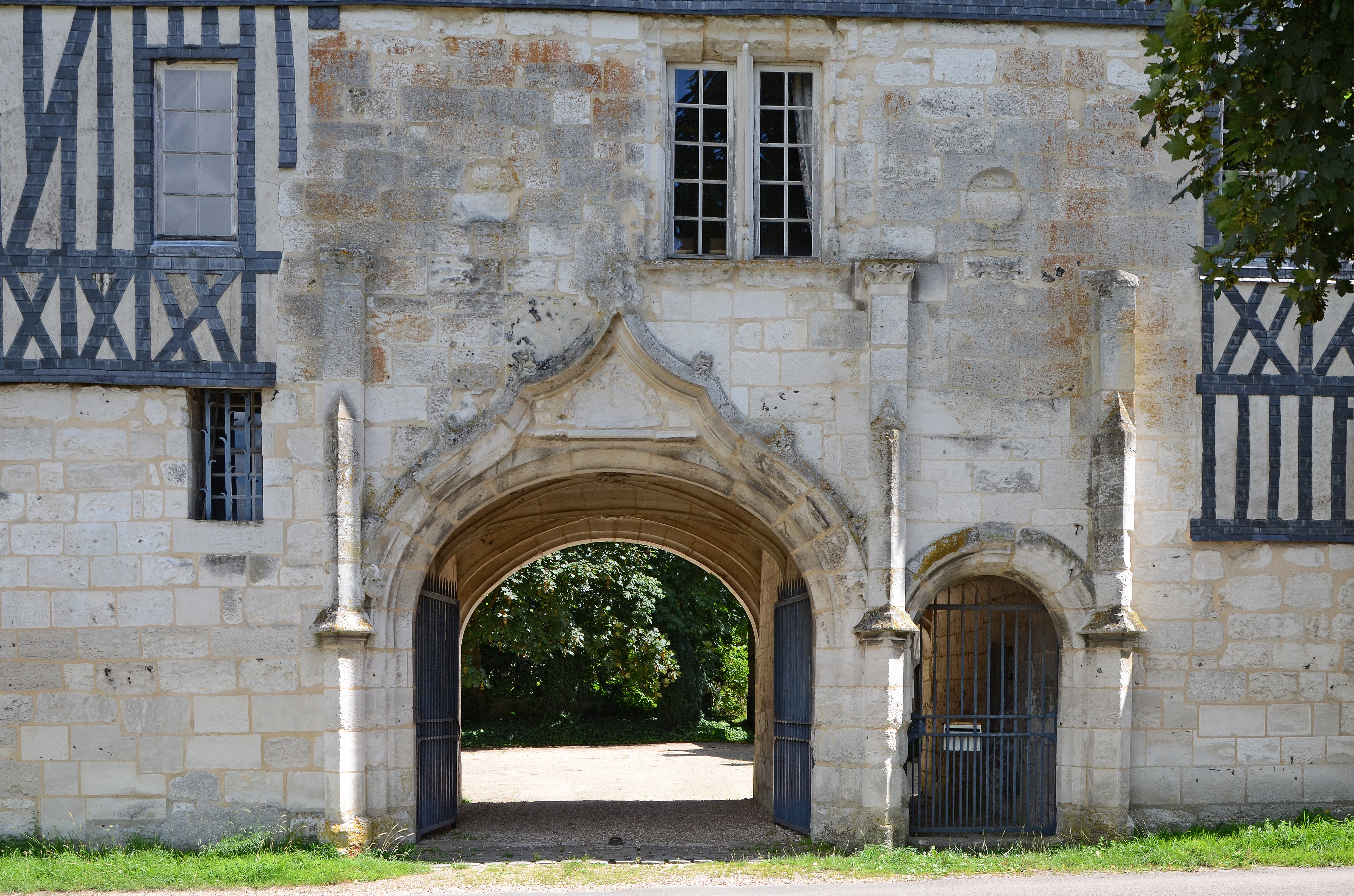 Manoir de Marbeuf à Sahurs, Seine Maritime, France